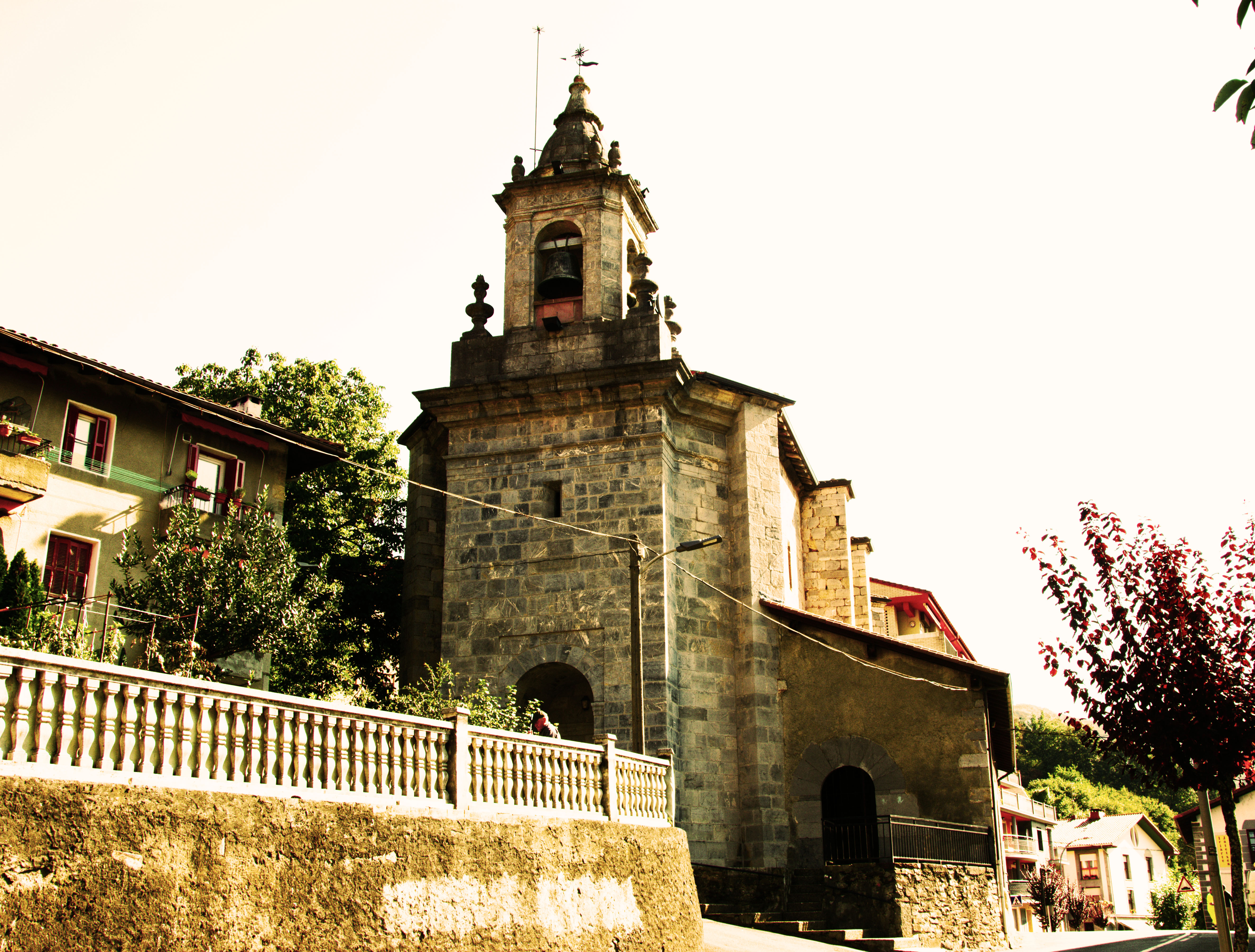 Berrobi